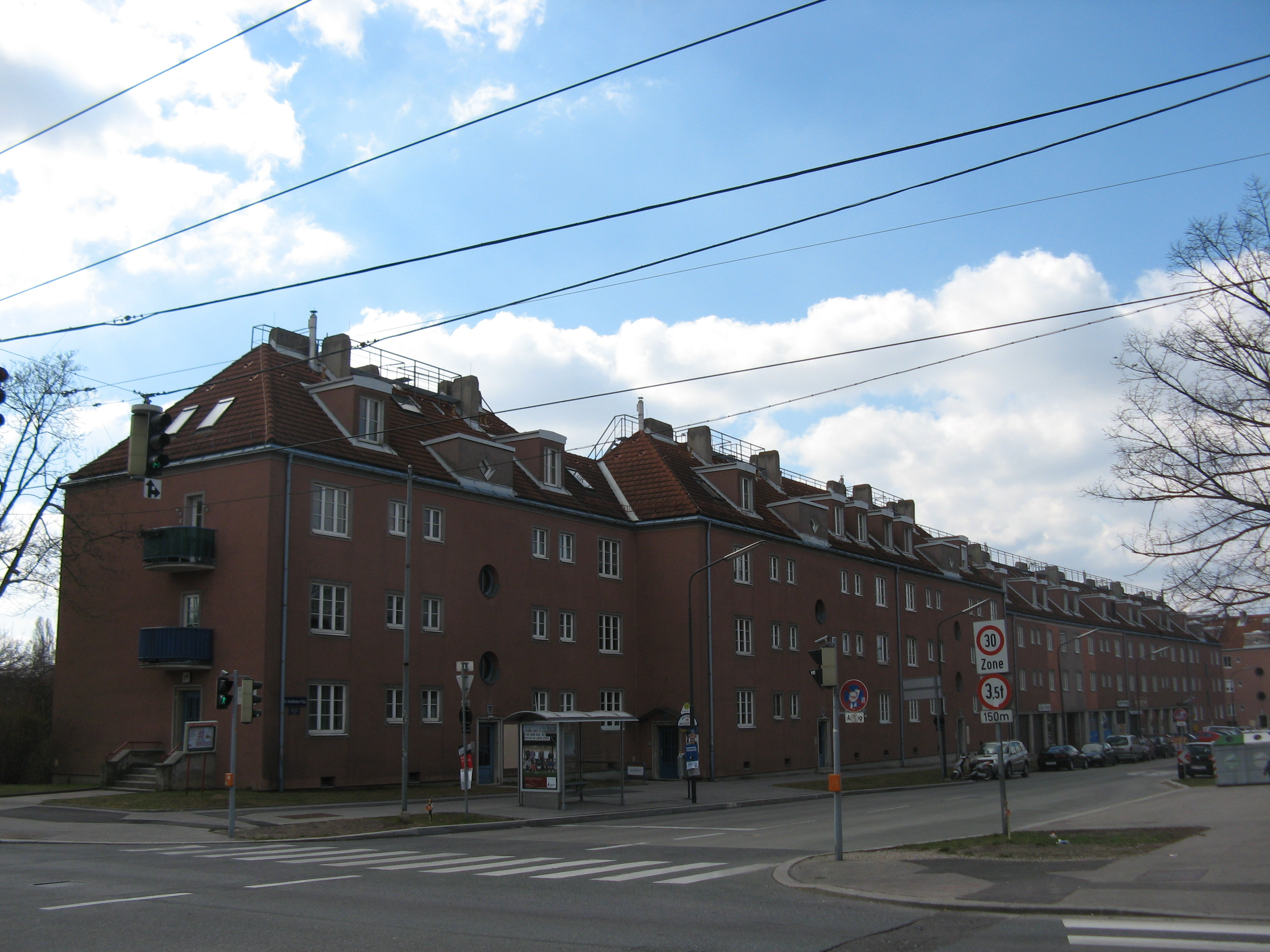 Städtische Wohnhausanlage (1947-51), Stockholmer Platz 1-17, Wien-Favoriten